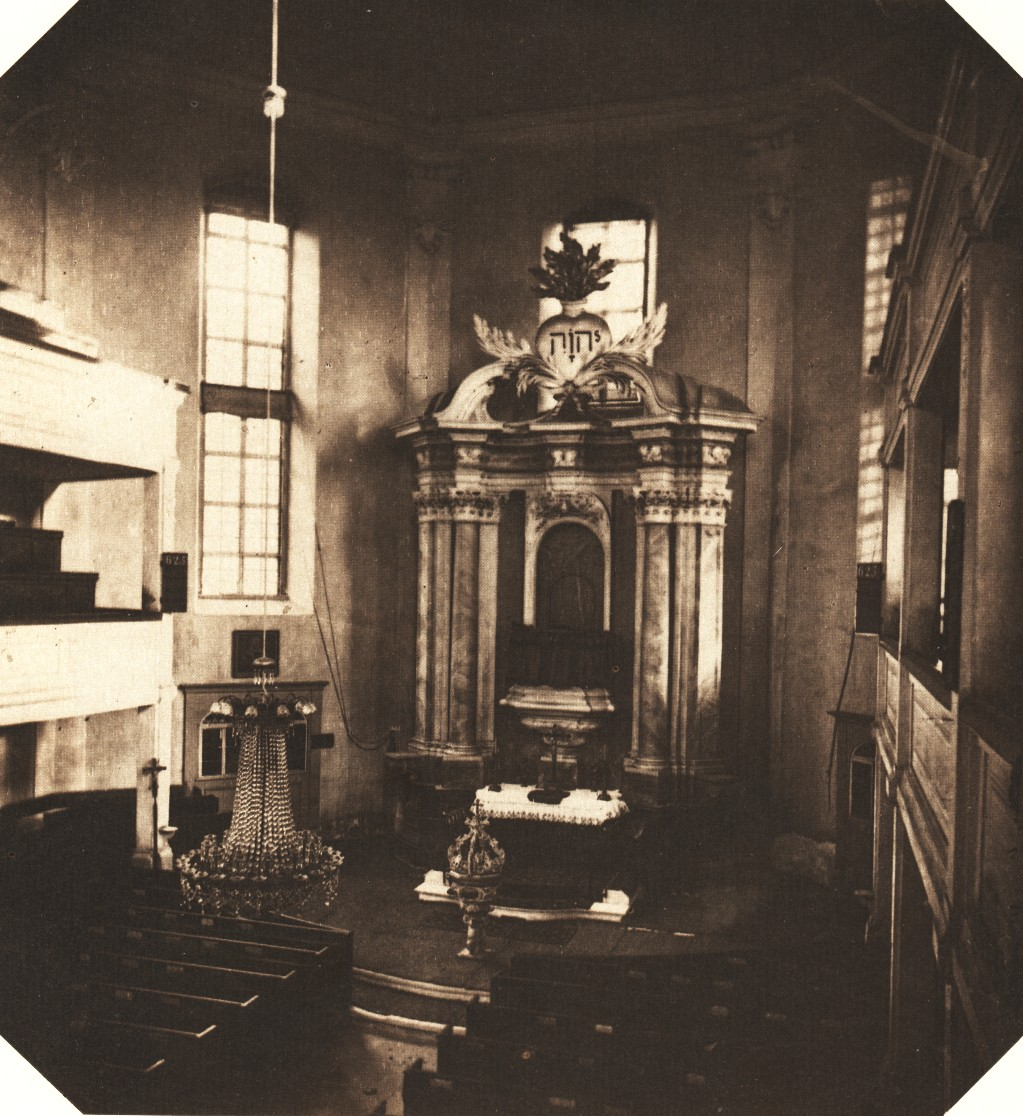 Das Innere der Loschwitzer Kirche.